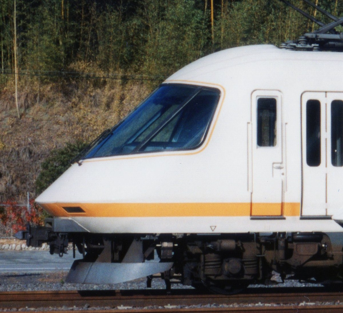 外観